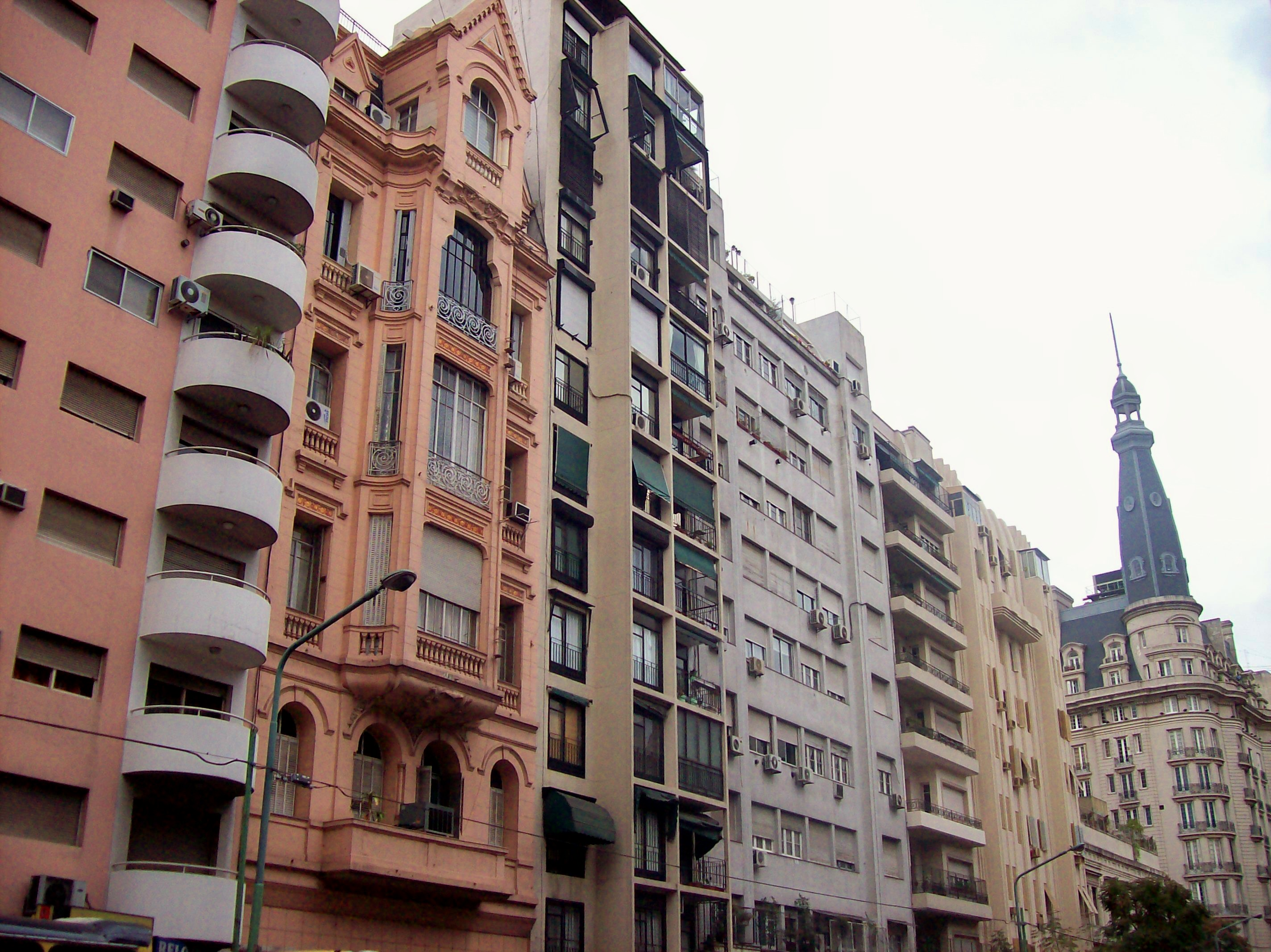 Avenida Callao al 500, lado este, (entre Tucumán y Lavalle) en la Ciudad de Buenos Aires. Observese lo ecléctico de las fachadas, tan común en Bs. As. Tomada de NNO a SSE